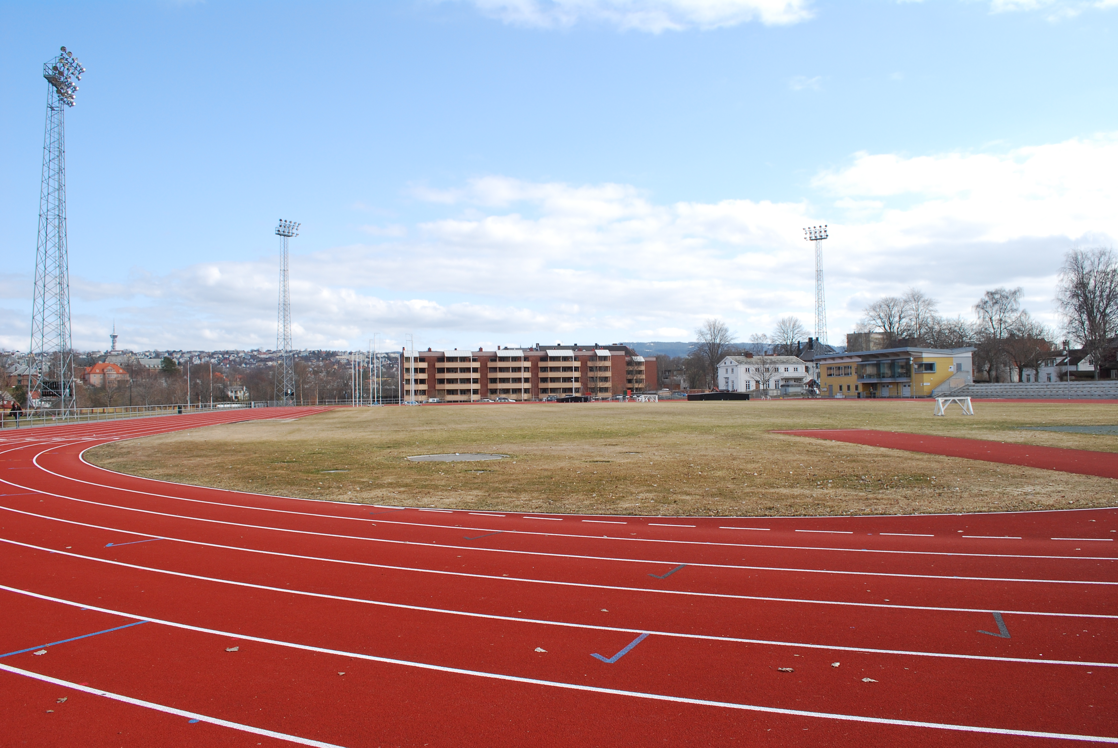 Friidrettsanlegget Øya stadion ved Nidarø på Øya i Trondheim.